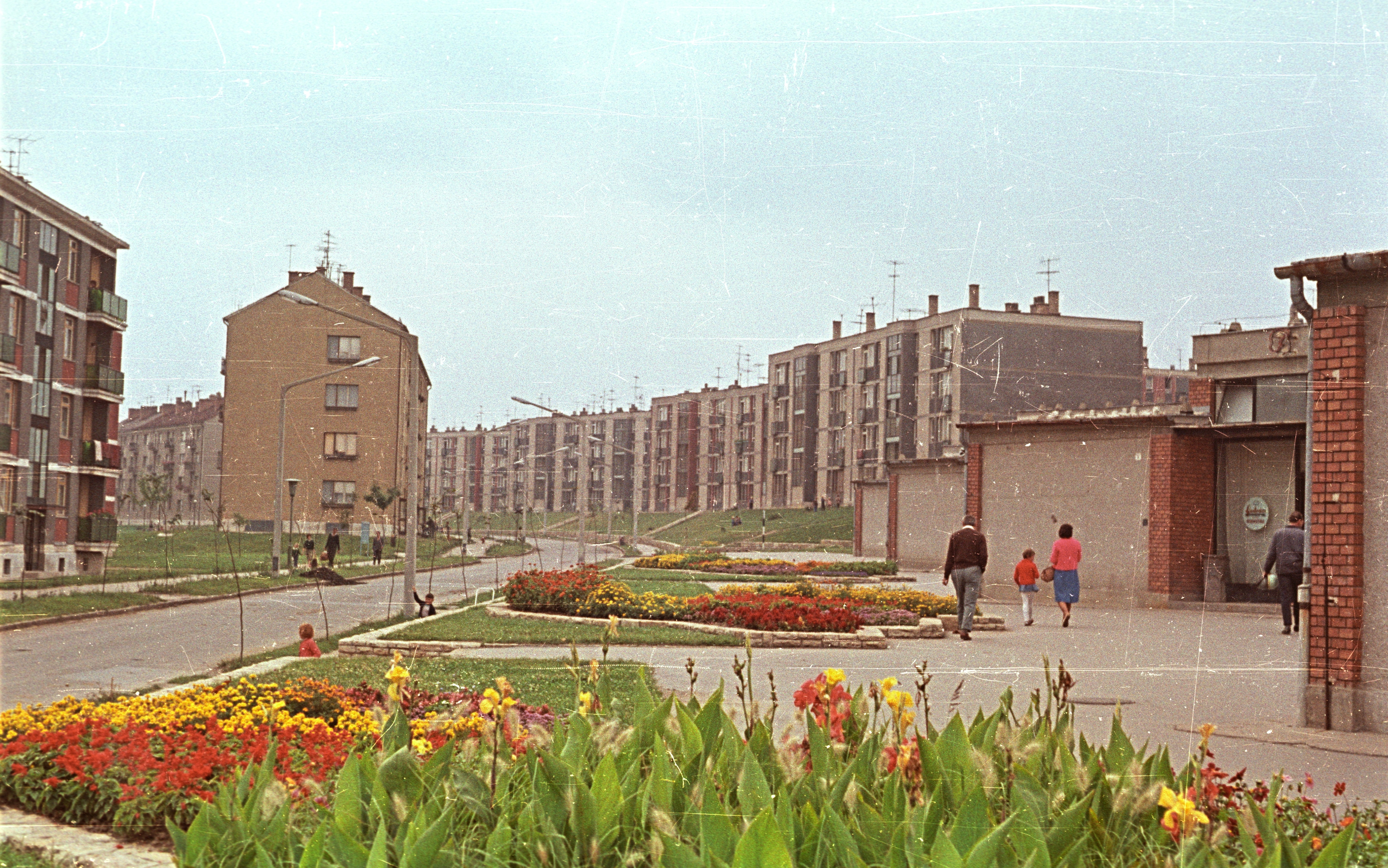 Május 1. út. Location: Hungary Tags: colorful, street view, blocks, flower Title: Május 1. út.